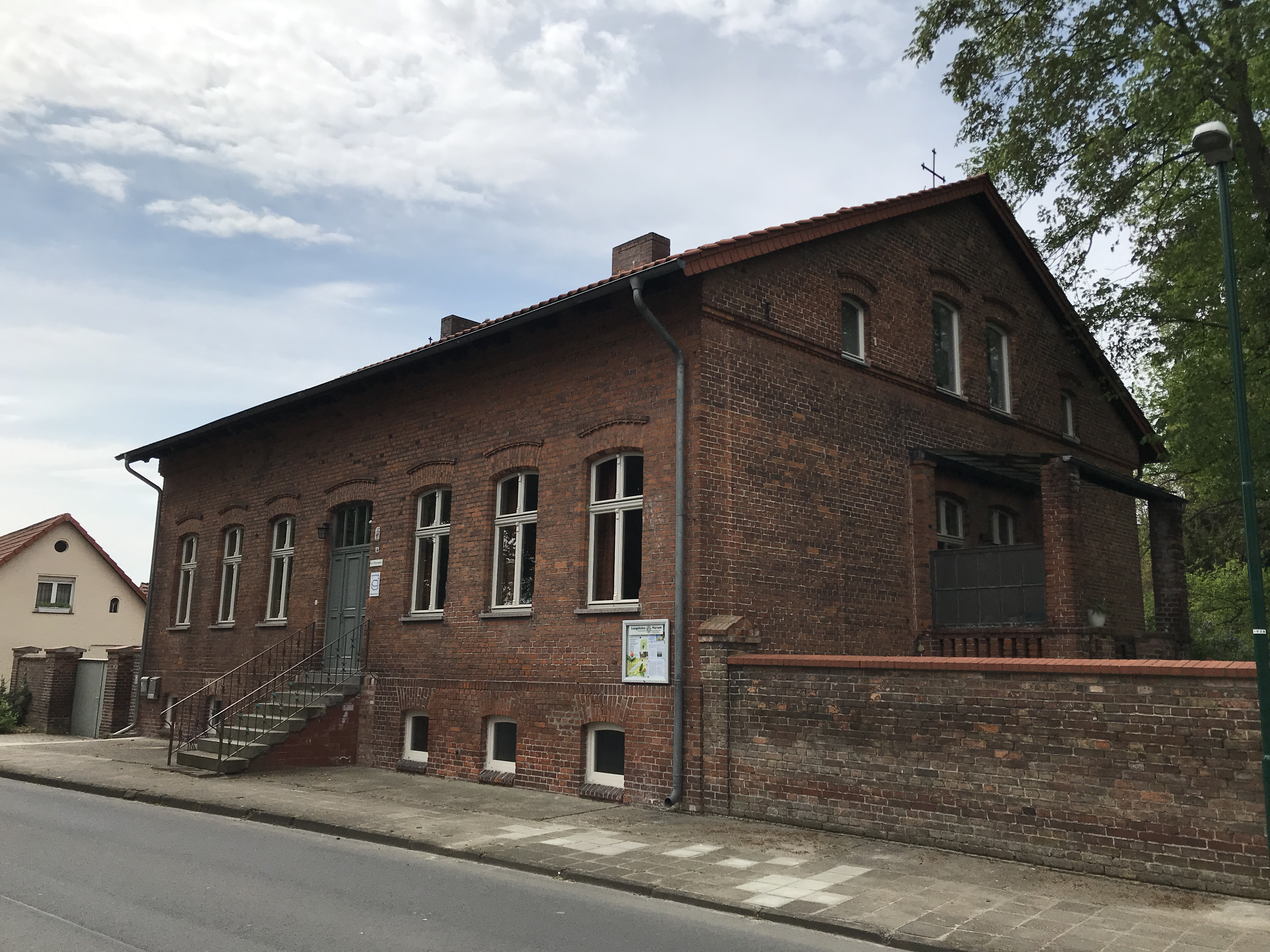 Schlalach ist ein Ortsteil der amtsangehörigen Gemeinde Mühlenfließ im Landkreis Potsdam-Mittelmark in Brandenburg.